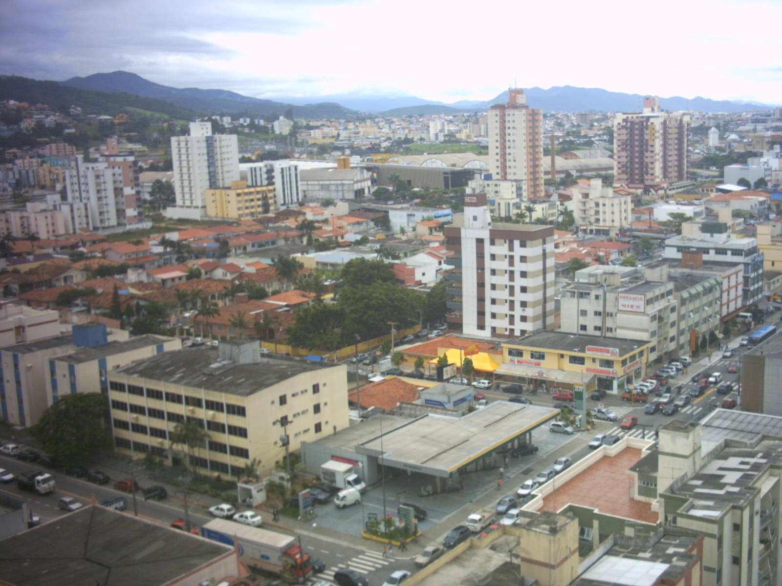 Vista de São José, Santa Catarina, Brasil